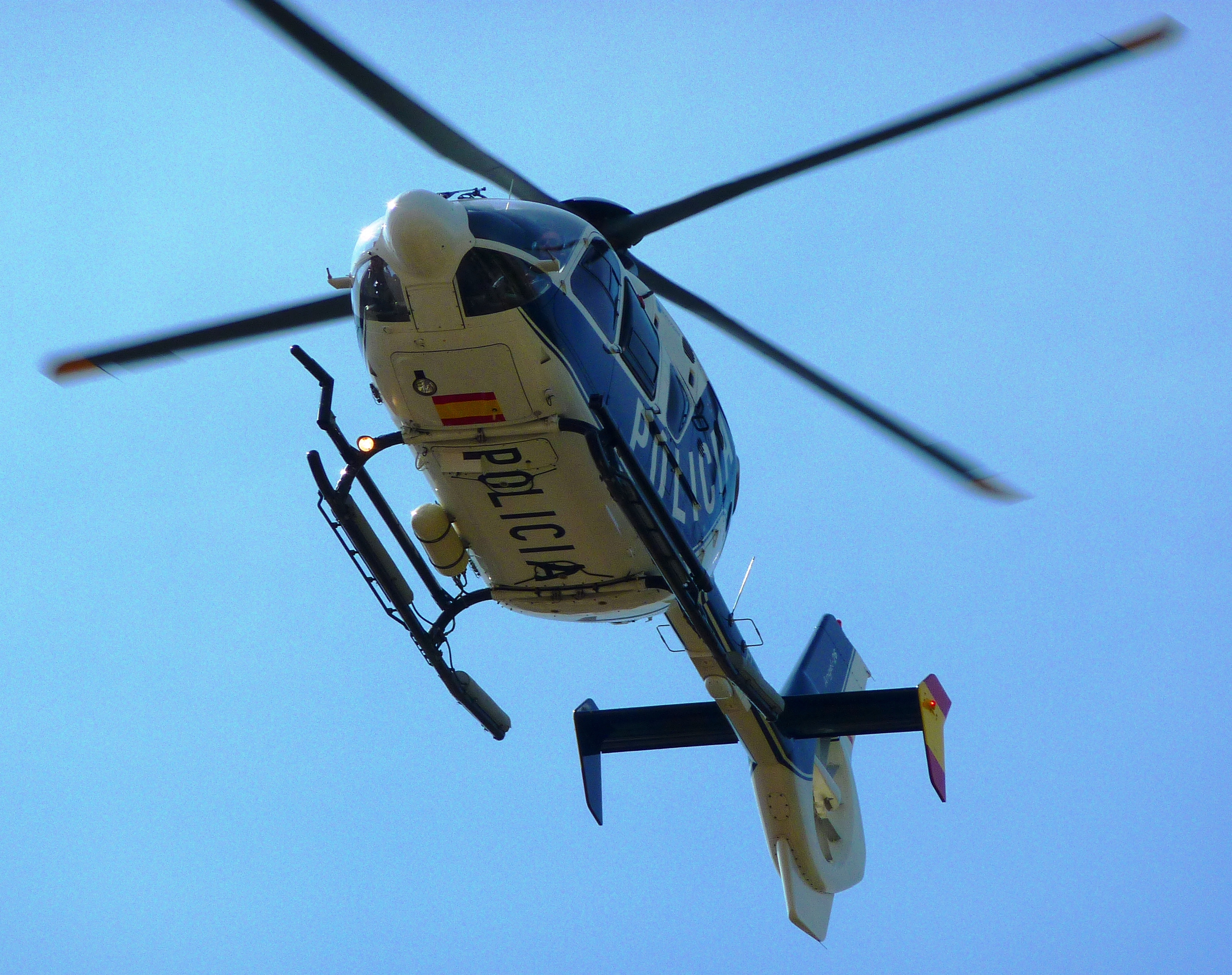 EC-135P-2+ del Cuerpo Nacional de Policía de España.